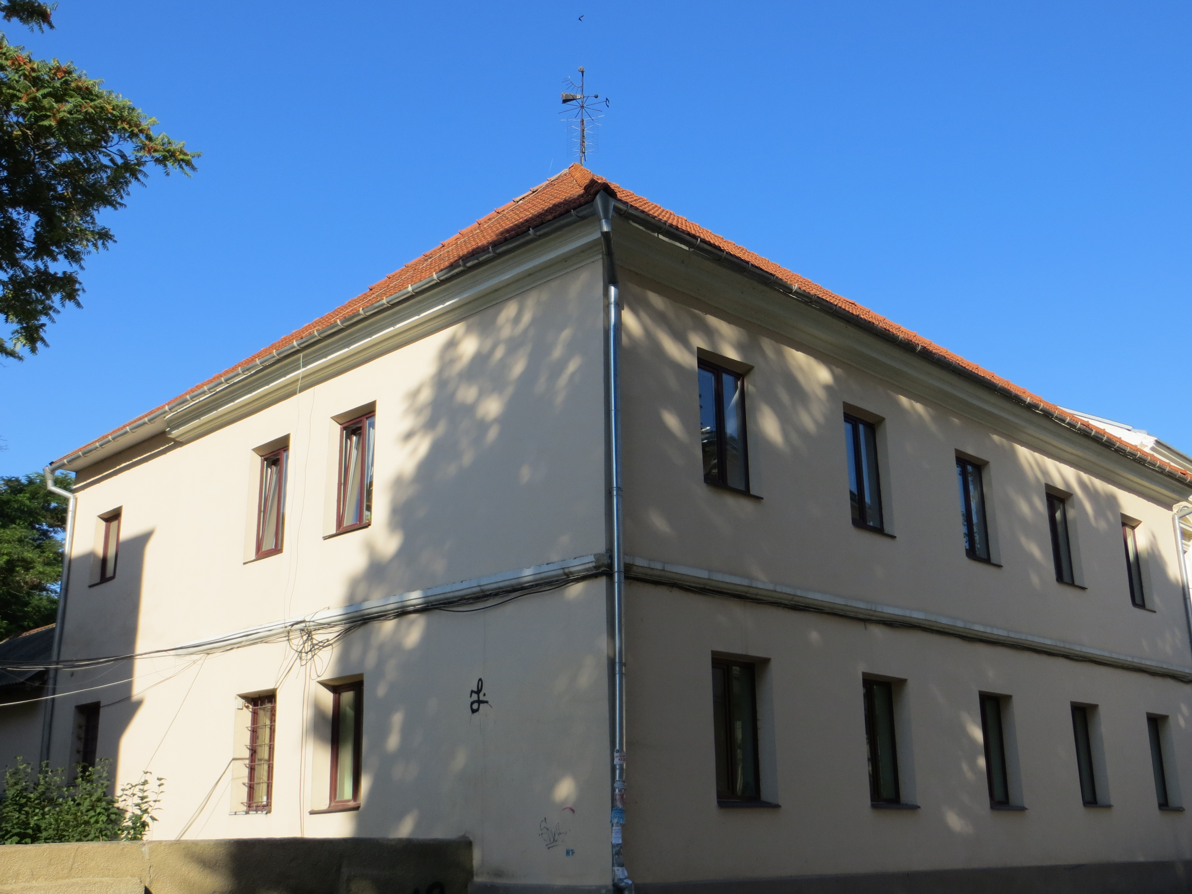 Будинок школи, в якій навчався Емінеску М.-румунський поет., Чернівці, вул.Шкільна,4